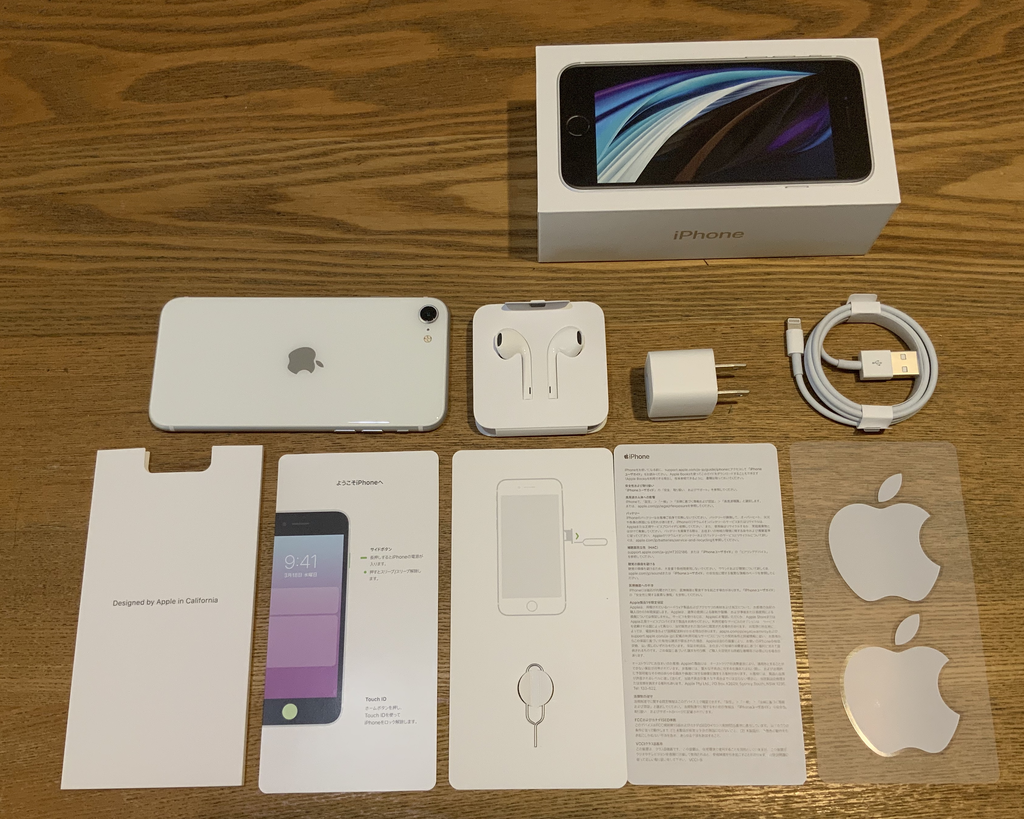 iPhone SE(第2世代)の箱、Designed by Apple in California、説明書、本体、Lightning - USBケーブル、5W USB電源アダプタ、SIMピン